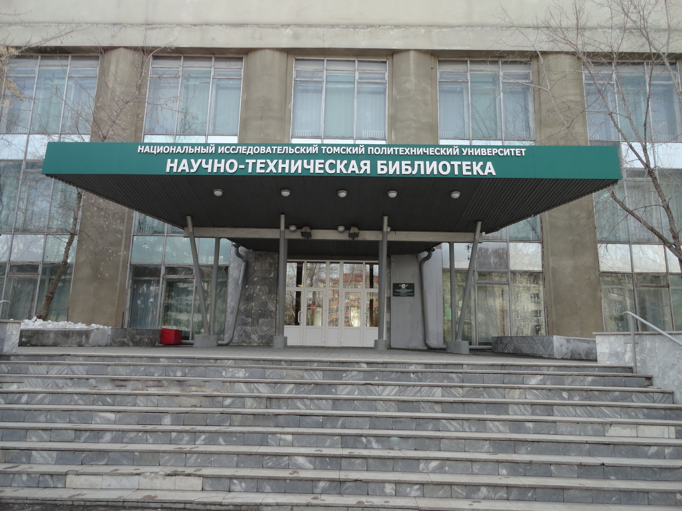 Научно-техническая библиотека Томского политехнического университета